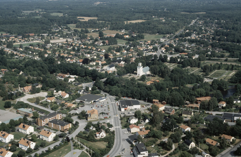 Mörrums kyrka. Bilden är tagen mot (väderstreck): NO Motiv: Mörrum Nyckelord: Flygbilder, Riksintressen Kategori: IndustriortMörrums kyrka. Bilden är tagen mot (väderstreck): NO.